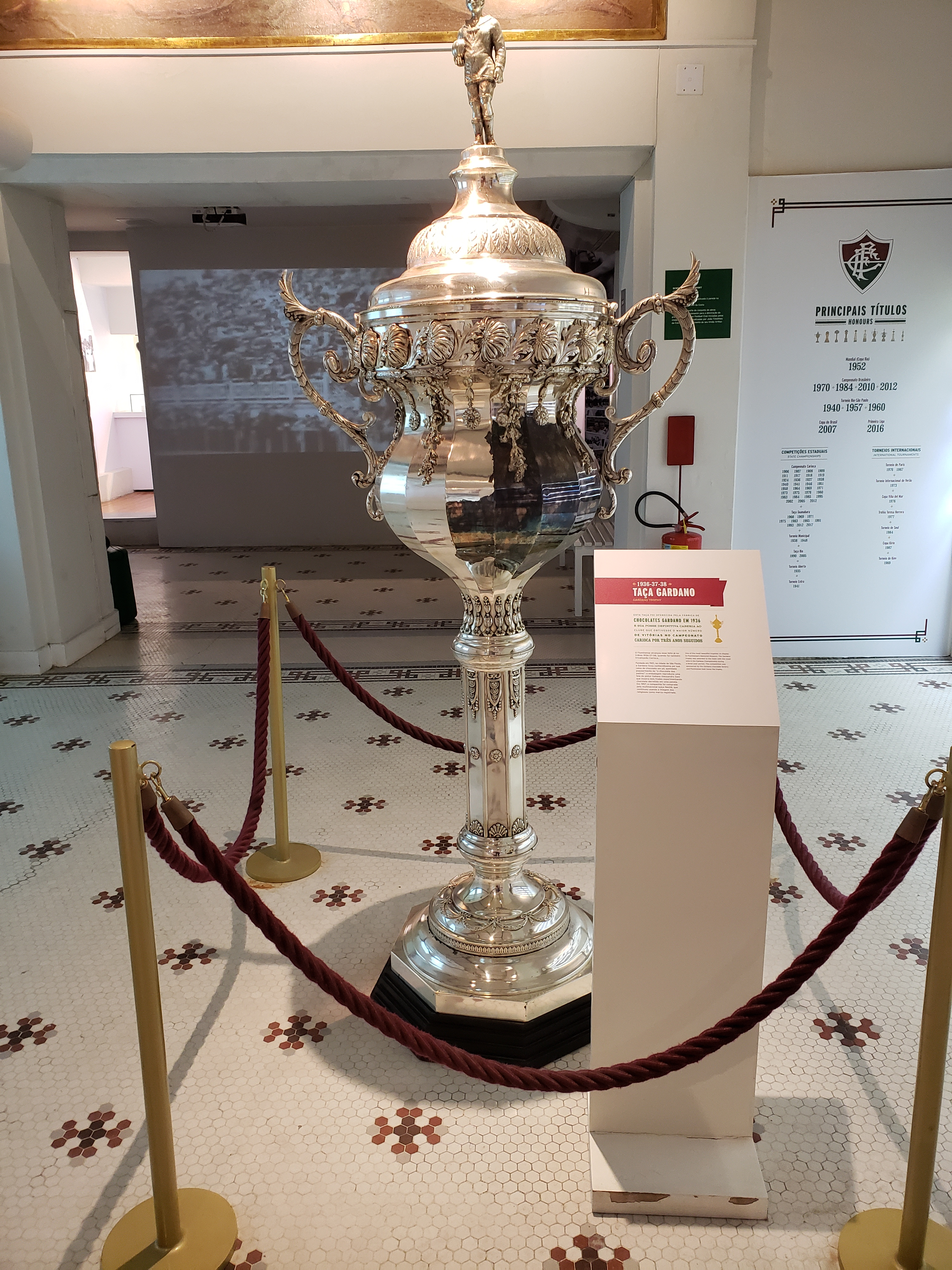 Taça disputada em dez jogos do Campeonato Carioca pela dupla Fla-Flu, entre 11 de outubro de 1936 e 20 de novembro de 1938, oferecida pela fabricante de chocolates Gardano, constituída de bronze, com 2,10 m de altura e cerca de 120 kg. Em partidas válidas pela disputa, foram 4 vitórias do Fluminense, 2 do Flamengo e 4 empates. Os dois clubes ganhariam todos os títulos cariocas entre 1936 (em 1936 havia duas ligas) e 1944.